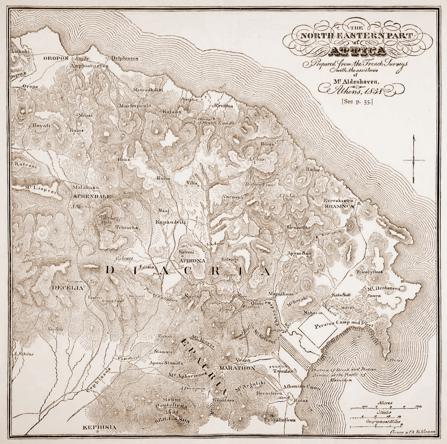 Antica mappa dell'Attica (Grecia), stampa ottenuta da incisione su legno. Atene 1838.